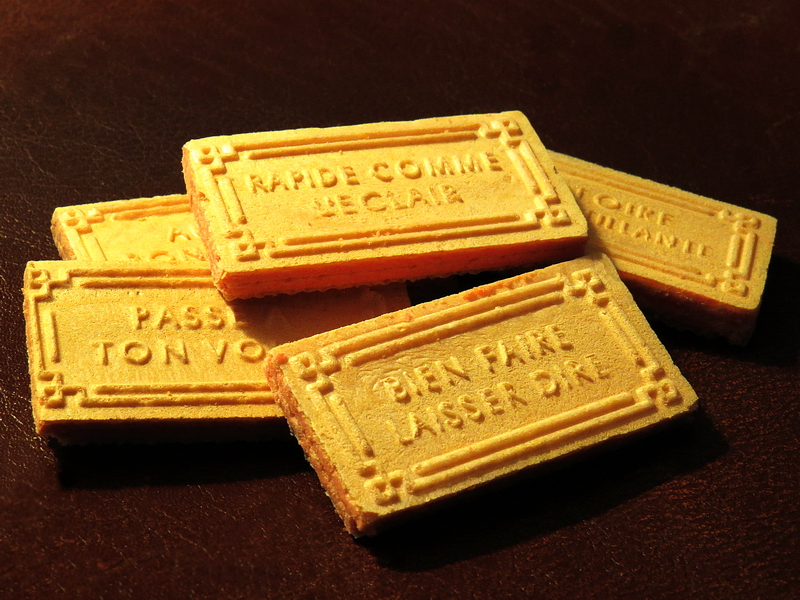 Gaufrettes portant des messages amusants